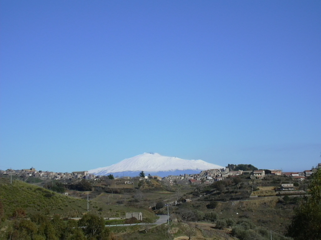 Aidone, Enna, Sicilia: panorama ovest, visto dalla contrada Montagna, una prospettiva che rende l'Etna sovrastante.